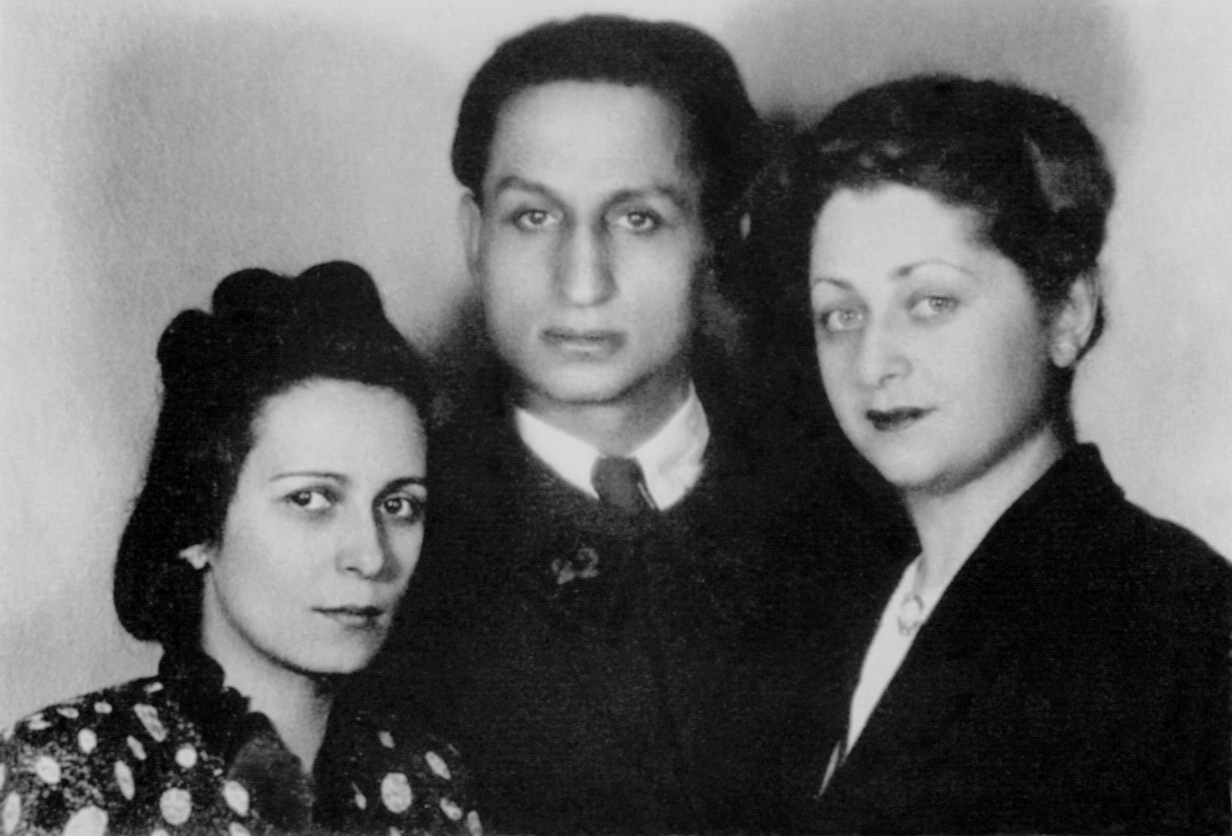 Давид Кнут, Ариадна Скрябина (Сара Кнут, слева) и Ева Циринская (Киршнер), Париж, февраль-март 1940